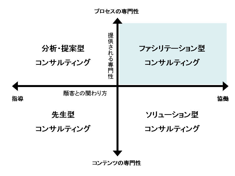 ケンブリッジ・テクノロジー・パートナーズ株式会社における、コンサルティングスタイルの分類方法